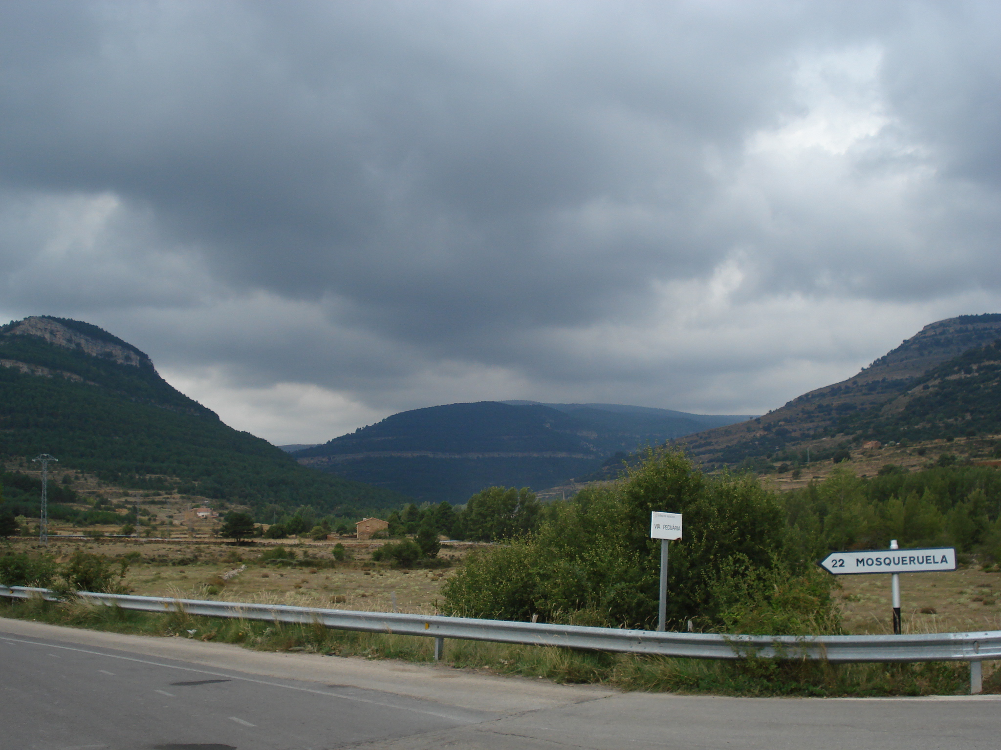 Paisatge de la carretera cap a Mosquerola. Punt de la frontera entre l'Aragó i el País Valencià. Aquesta foto està feta en el terme de Vilafranca i entre els termes de Mosqueruela i la Iglesuela del Cid